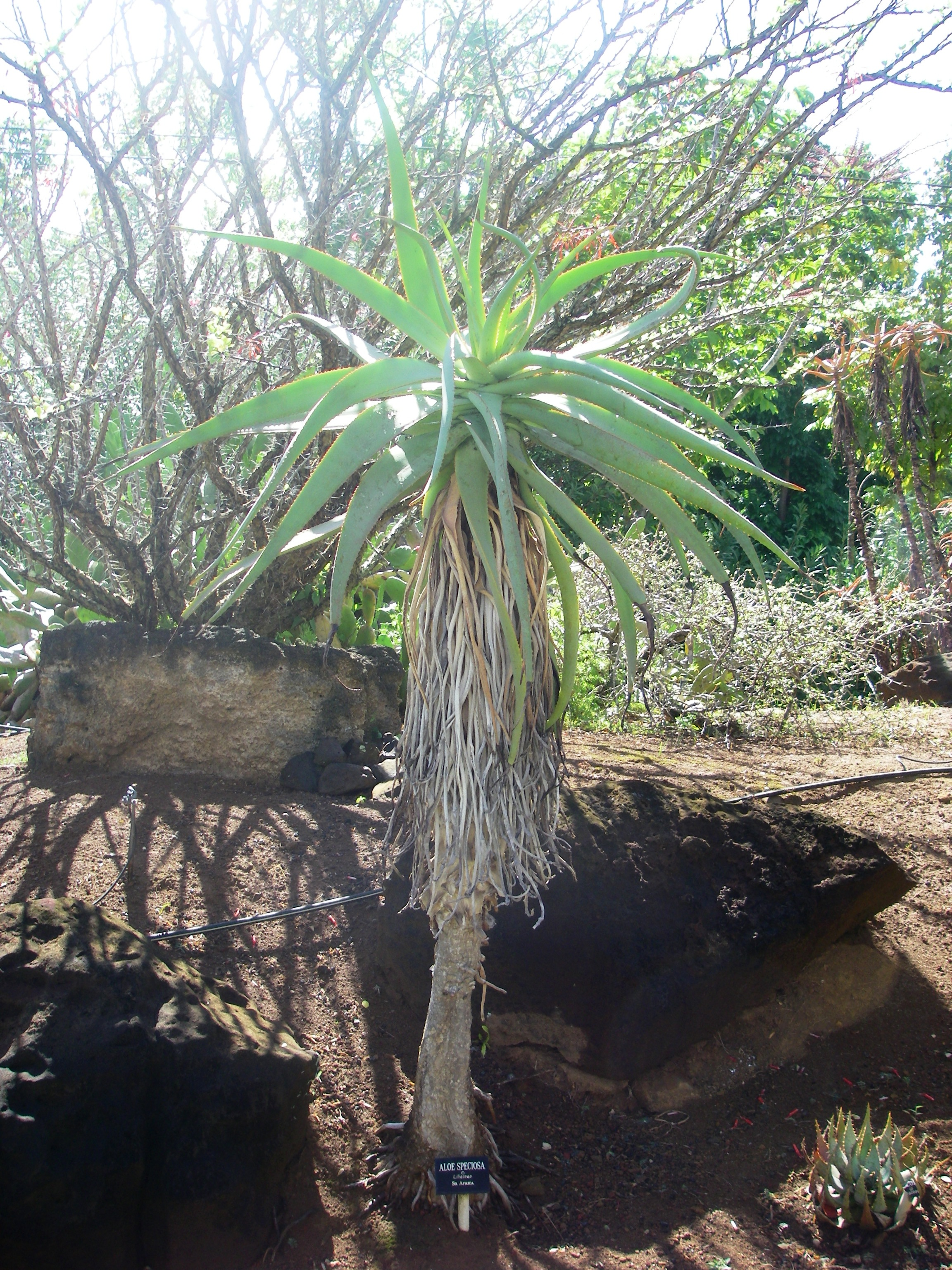 Aloe Speciosa = Aloe hexapetala